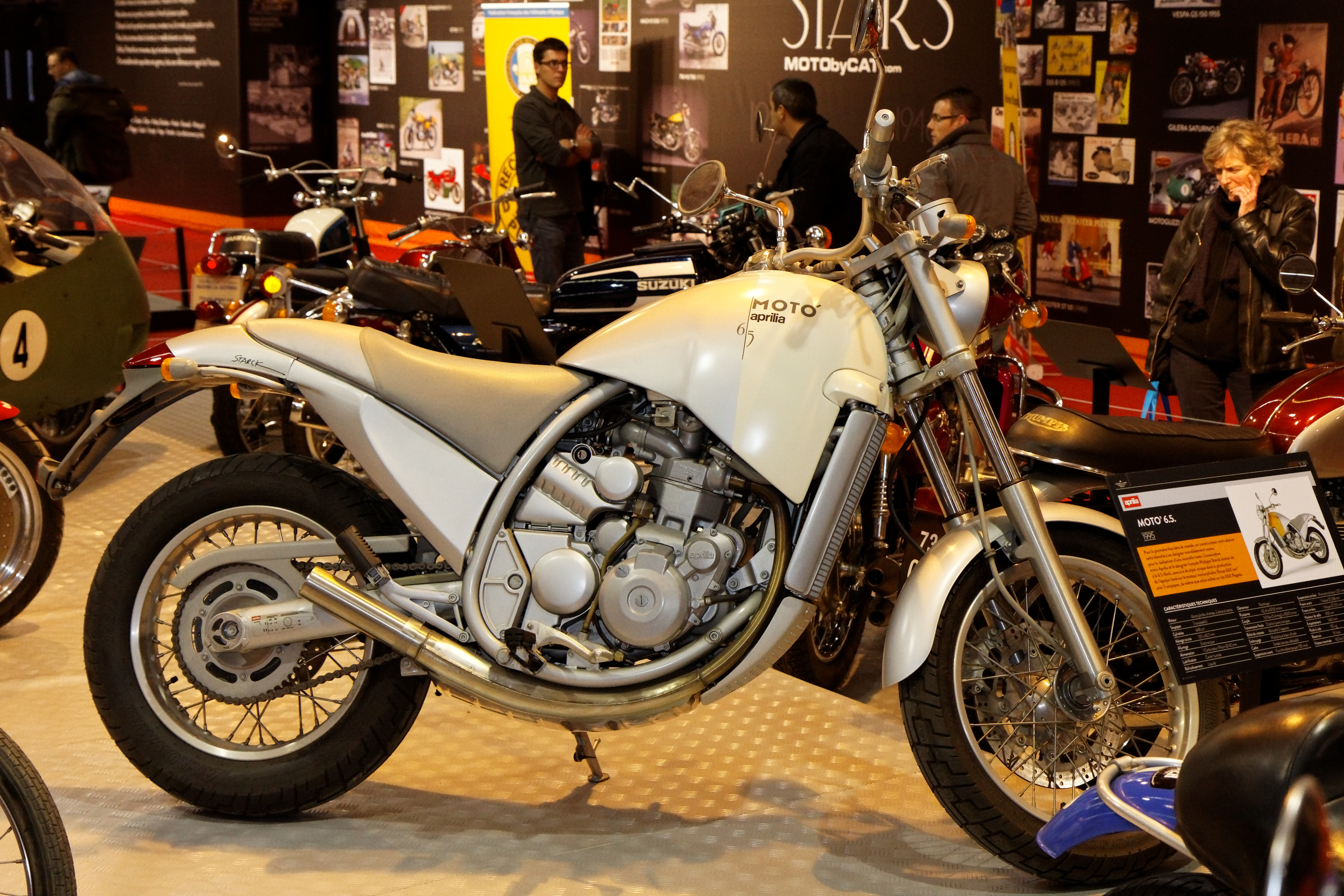 Aprilia - Moto' 6.5.